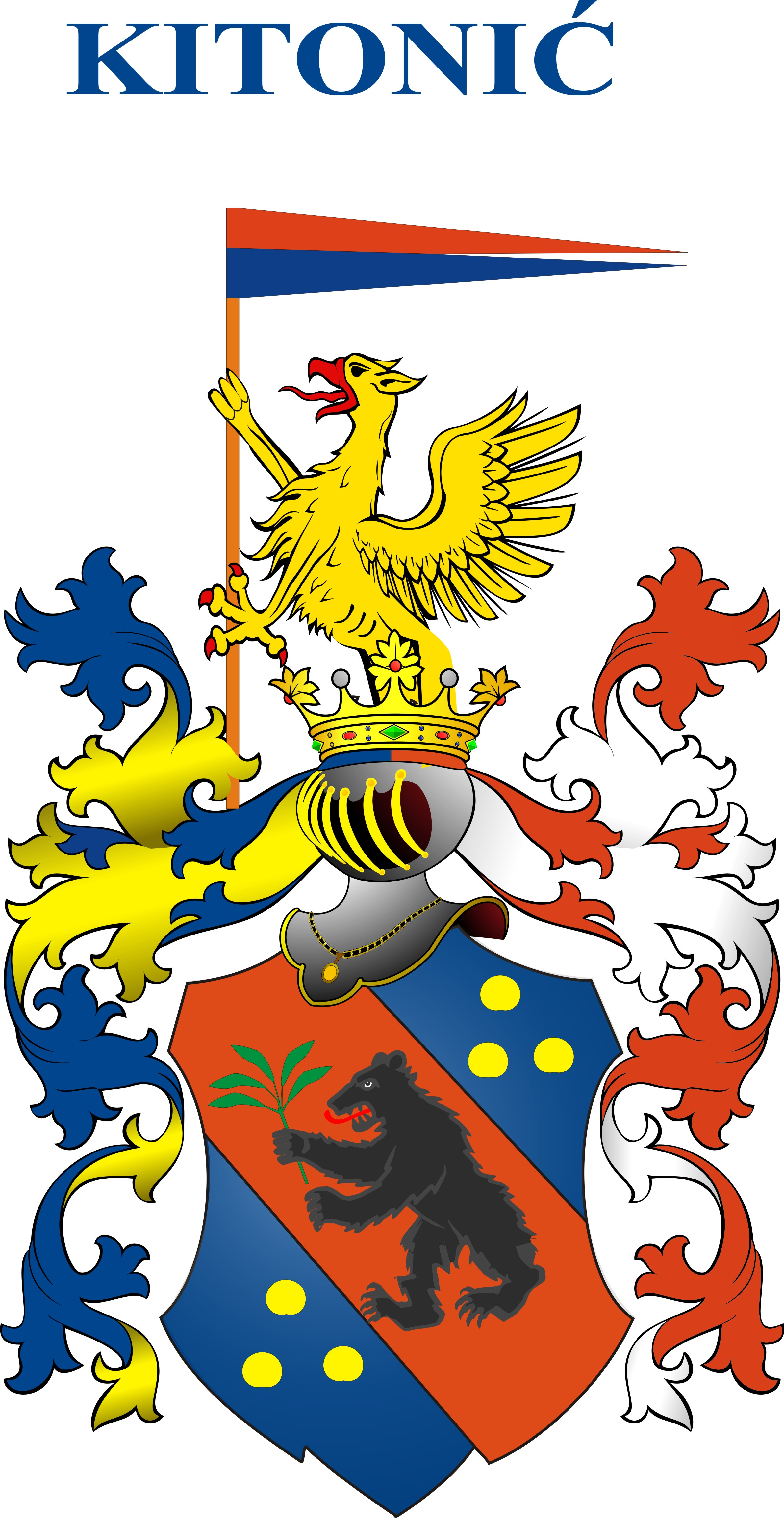 Grb Ivana Kitonića iz 1593. godine